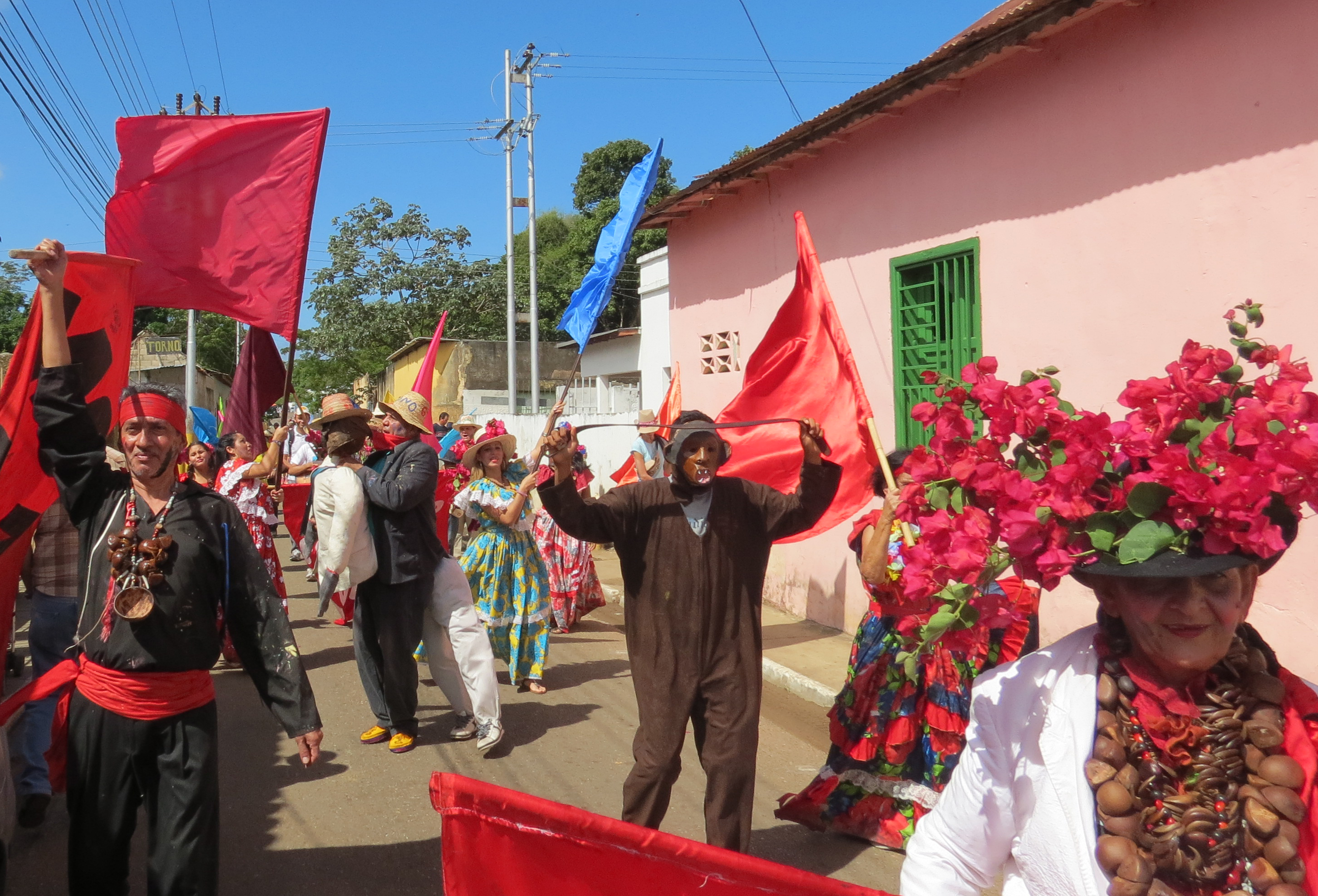 Una de las tradiciones más importantes de la Región Oriental. Celebrado en Caicara de Maturín, la Fiesta del Mono se realiza cada 28 de Diciembre de cada año. Su gente preserva esta Cultura motivando a los más Jóvenes a continuarla. Las diversas parrandas Bailan por todo el pueblo esparciendo su música y mostrando sus trajes y disfraces, ademas pintando las caras con pintura de añil.